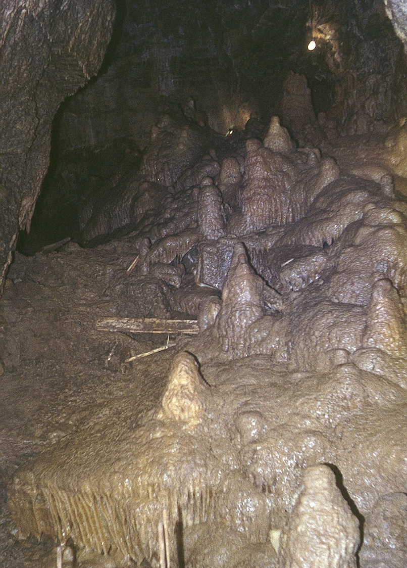 Eberstadter Tropfsteinhöhle: Tropfsteinformation 'Große Familie' während des Höhlenausbaus (vor Bau des Steges)